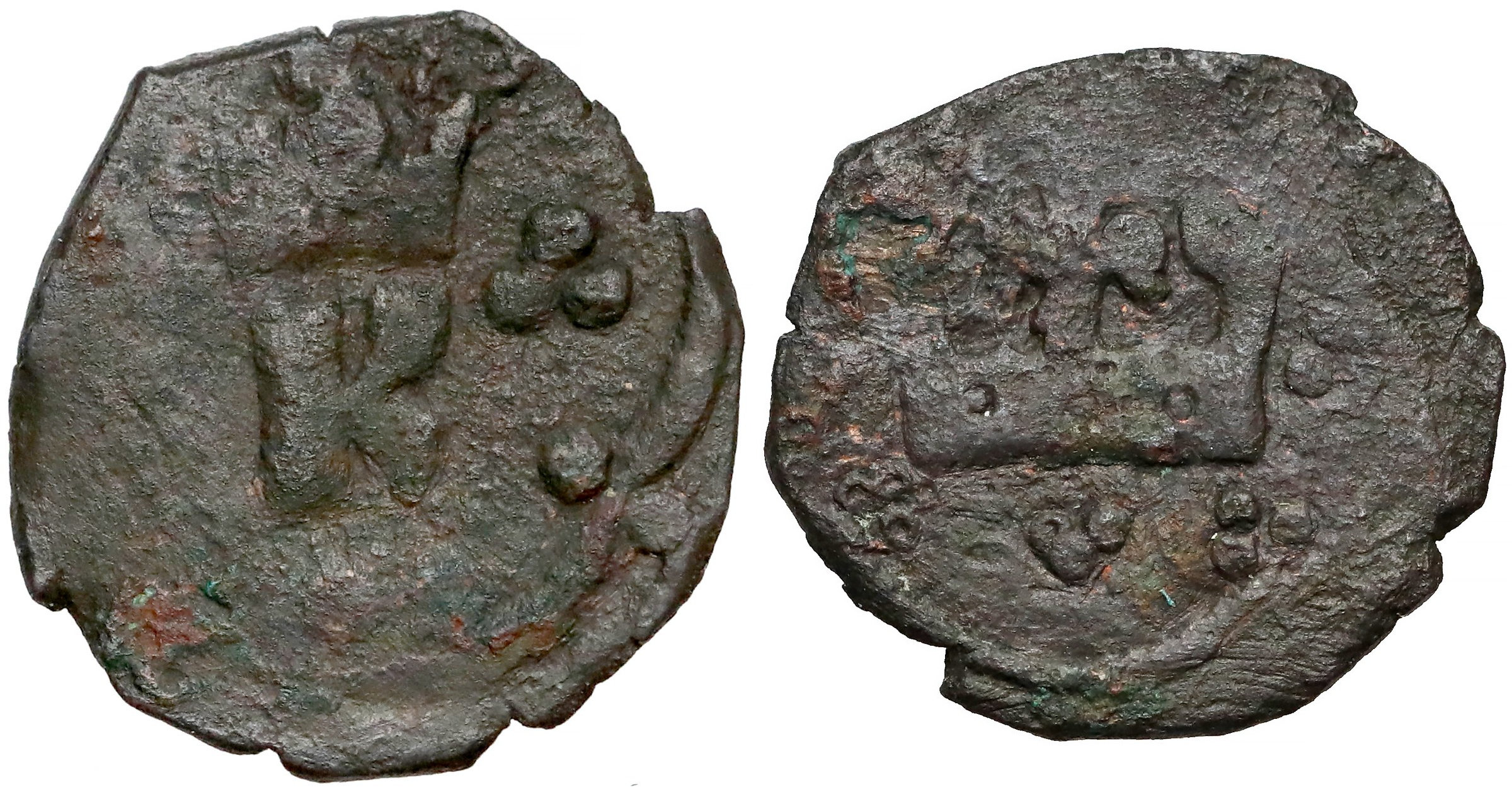 Puło ruskie Kazimierz III Lwów